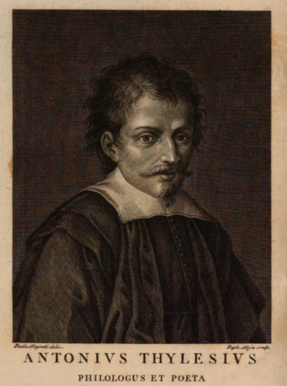 Антонио Телезио, итальянский гуманист. Гравюра из издания 1808 г.